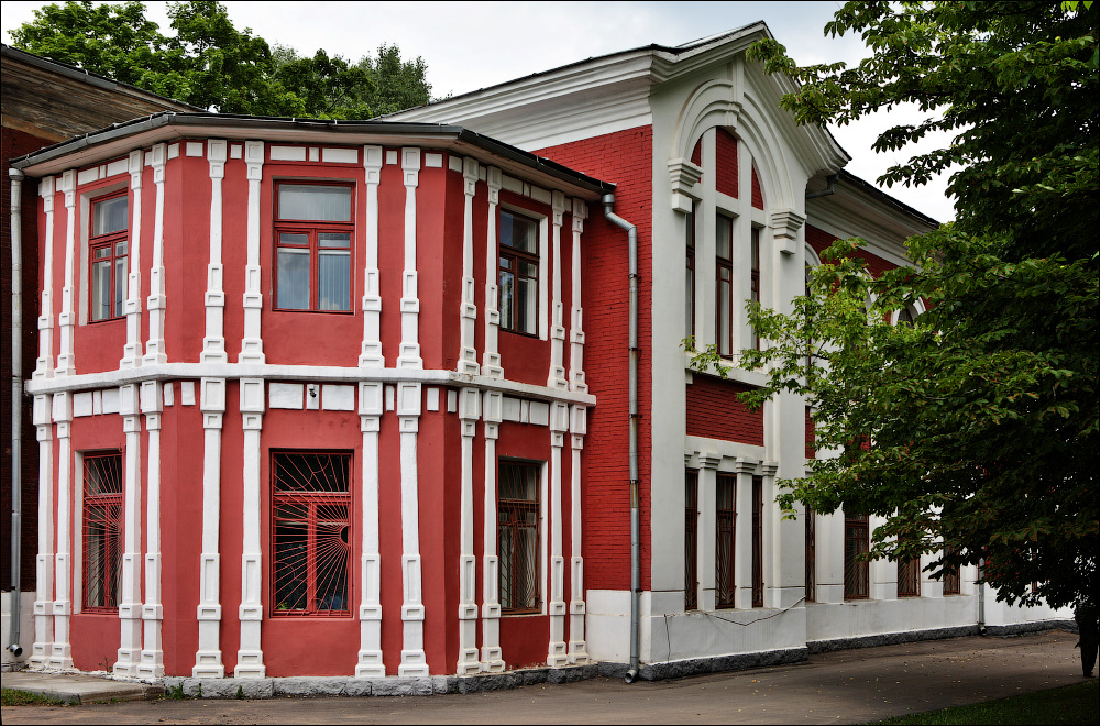 Замалёўкі Мінска